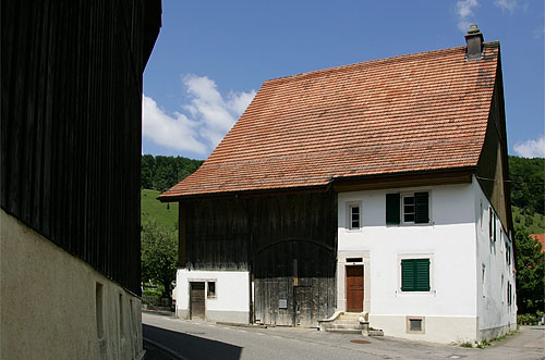 Haus an der Dorfstrasse in Dittingen